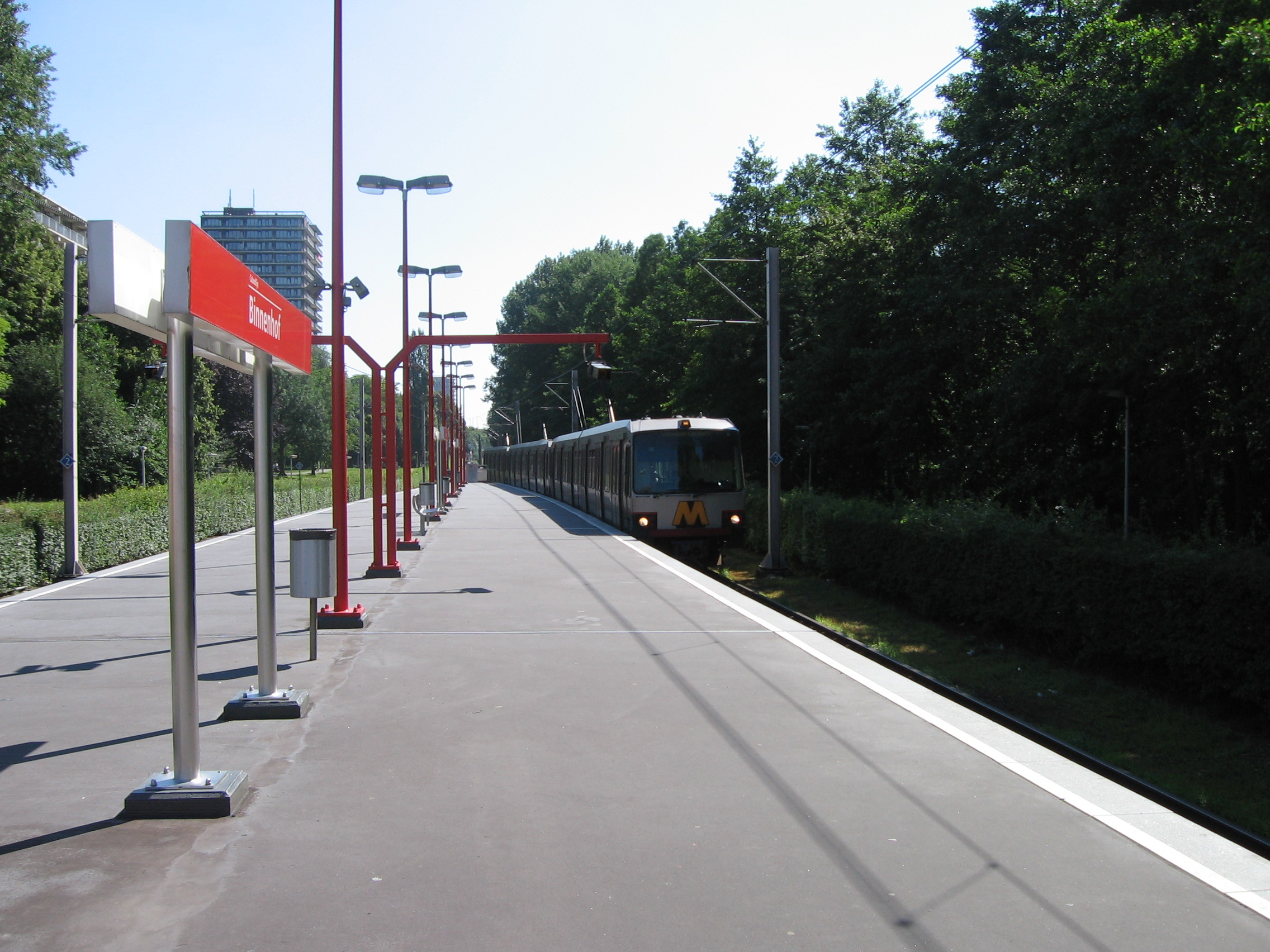 metro op perron 1 van metrostation Binnenhof.